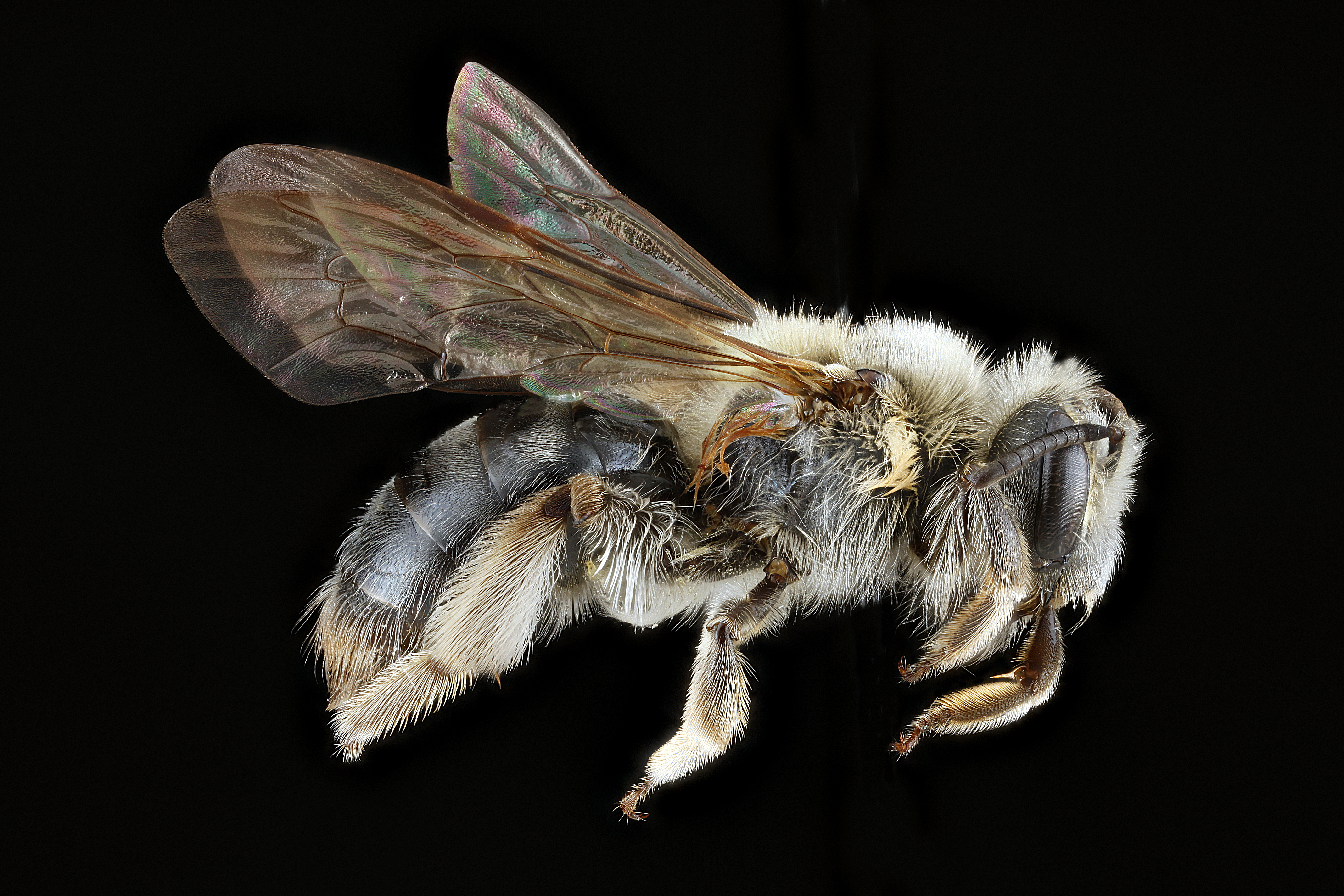 Andrena barbara, female